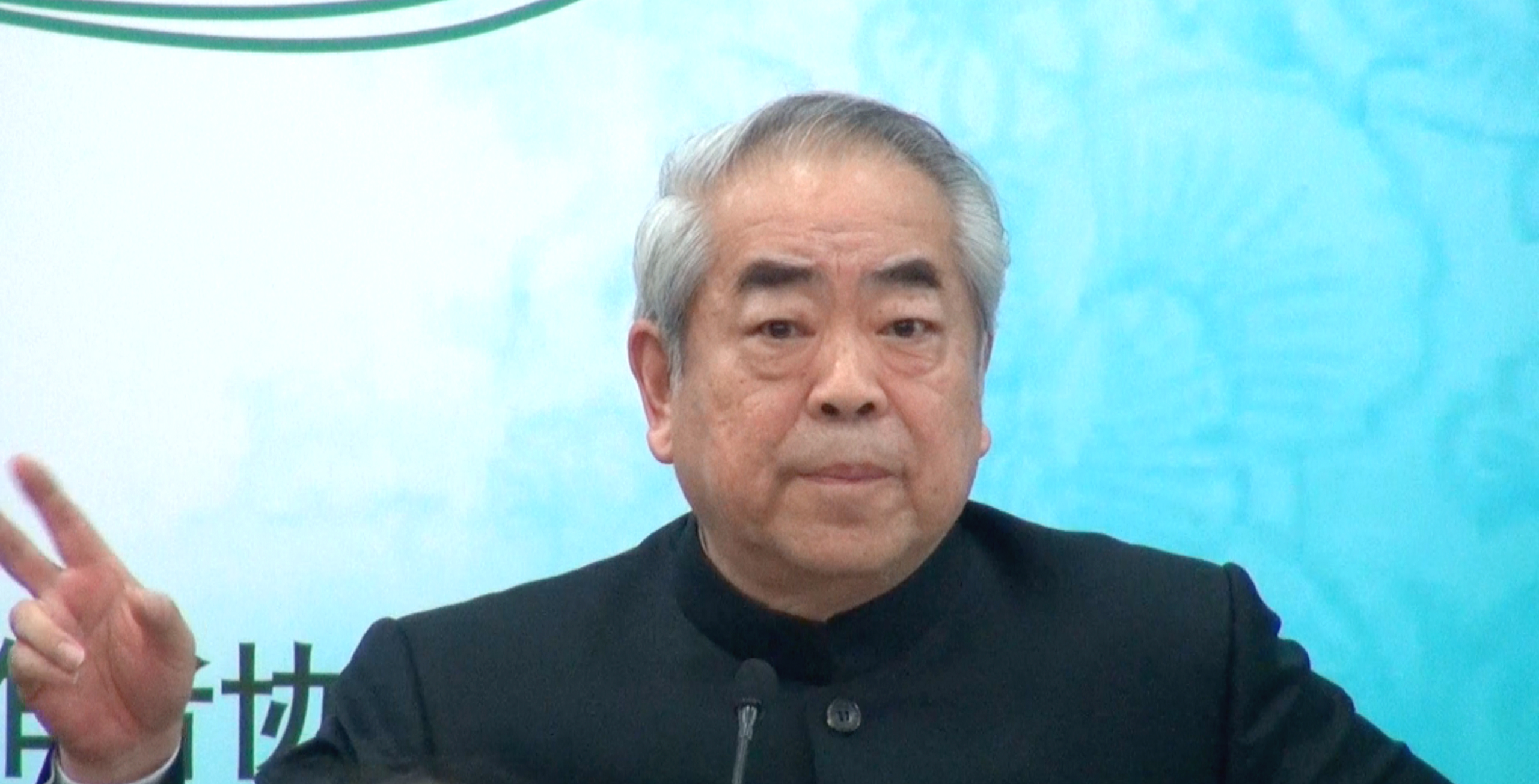 范曾Fan zeng